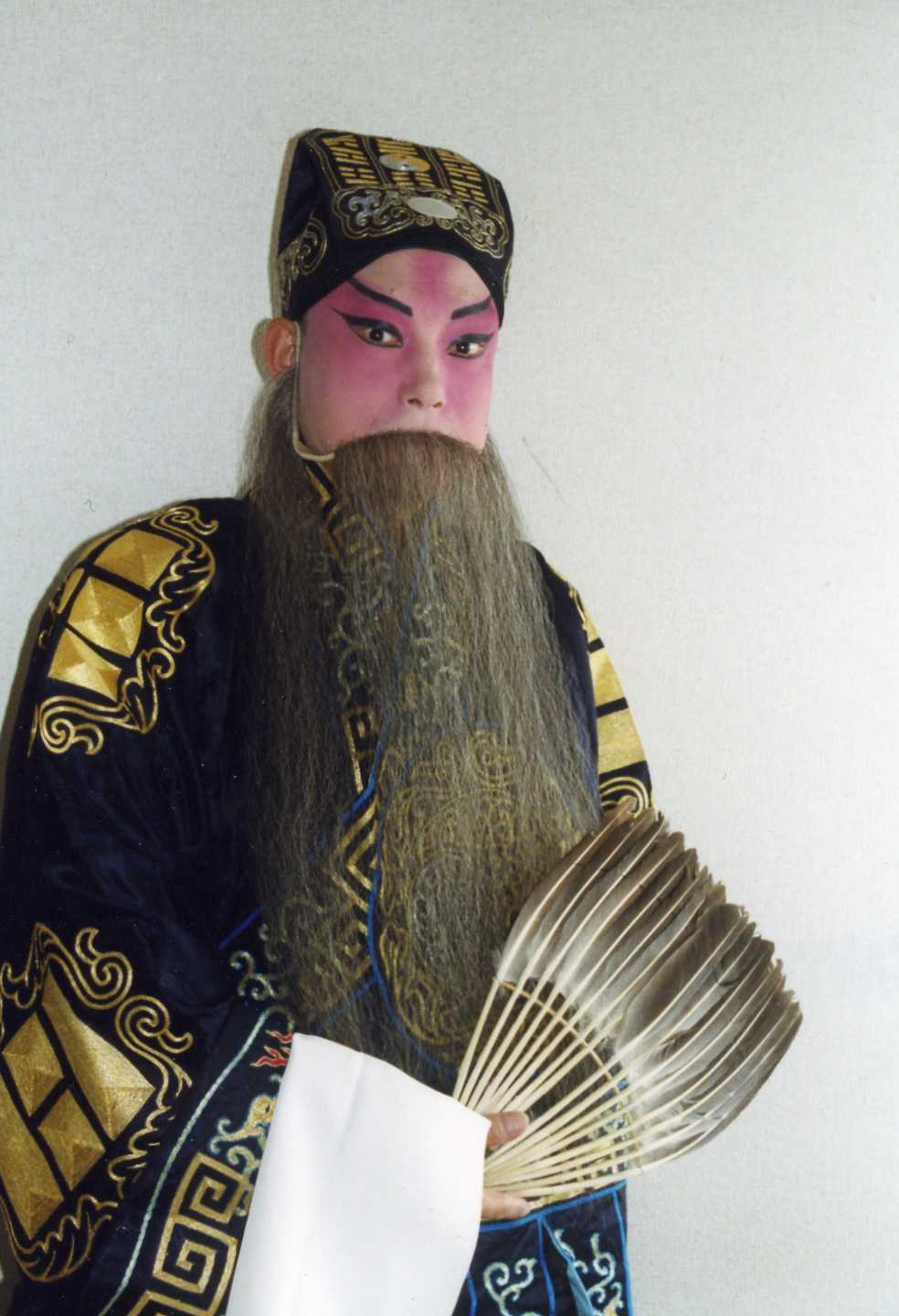 魯大鳴先生が演ずる京劇の諸葛孔明 Zhuge Liang on Beijing Opera,played by Mr.Lu Daming,the actor